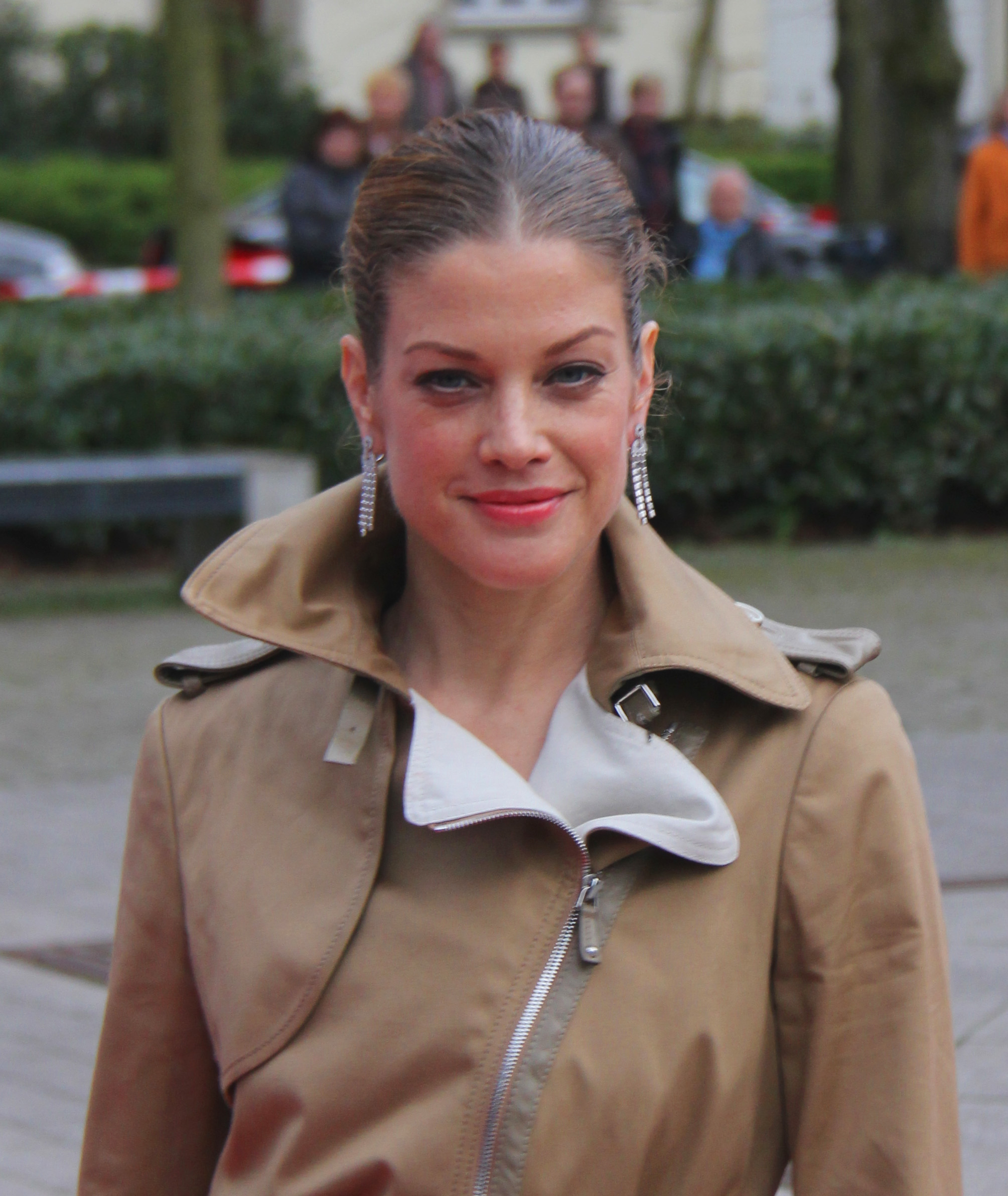 Grimme-Preisträgerin Marie Bäumer bei der Verleihung 2011